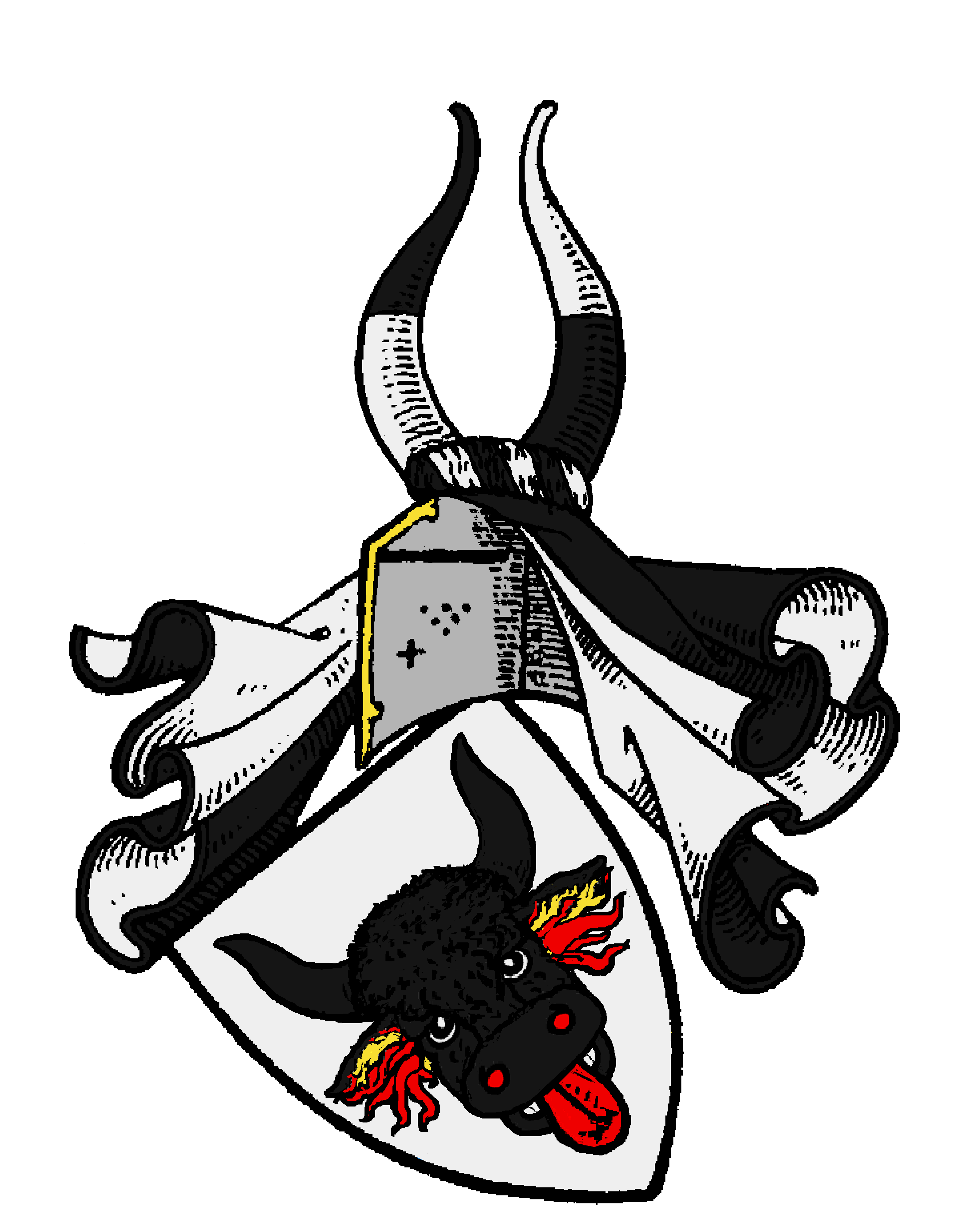 Stammwappen der altadligen Freiherren von Weißenbach